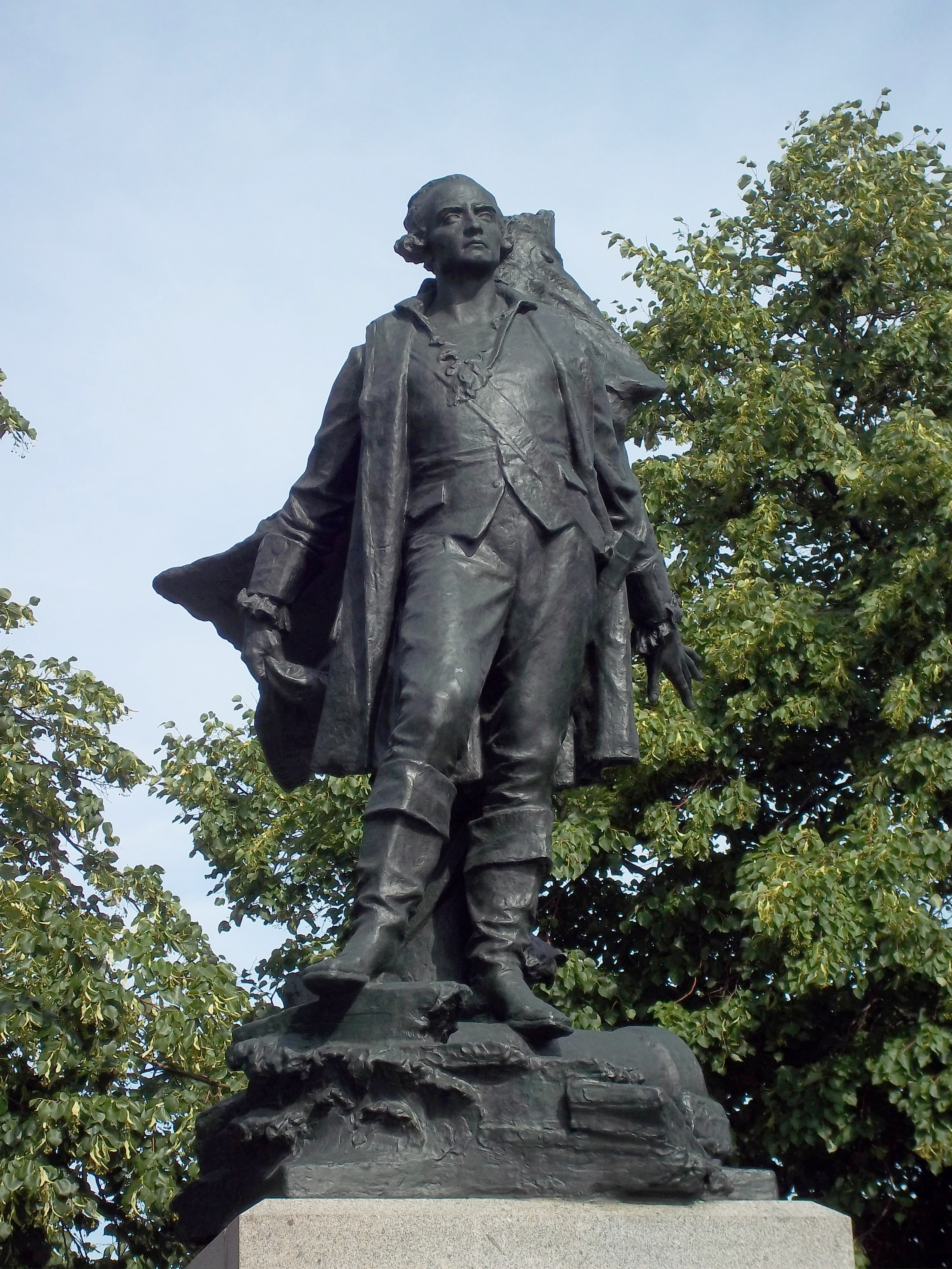 Monument à Jean Vauquelin, place Vauquelin, Vieux-Montréal, à l'ouest de l'Hôtel de Ville. fiche